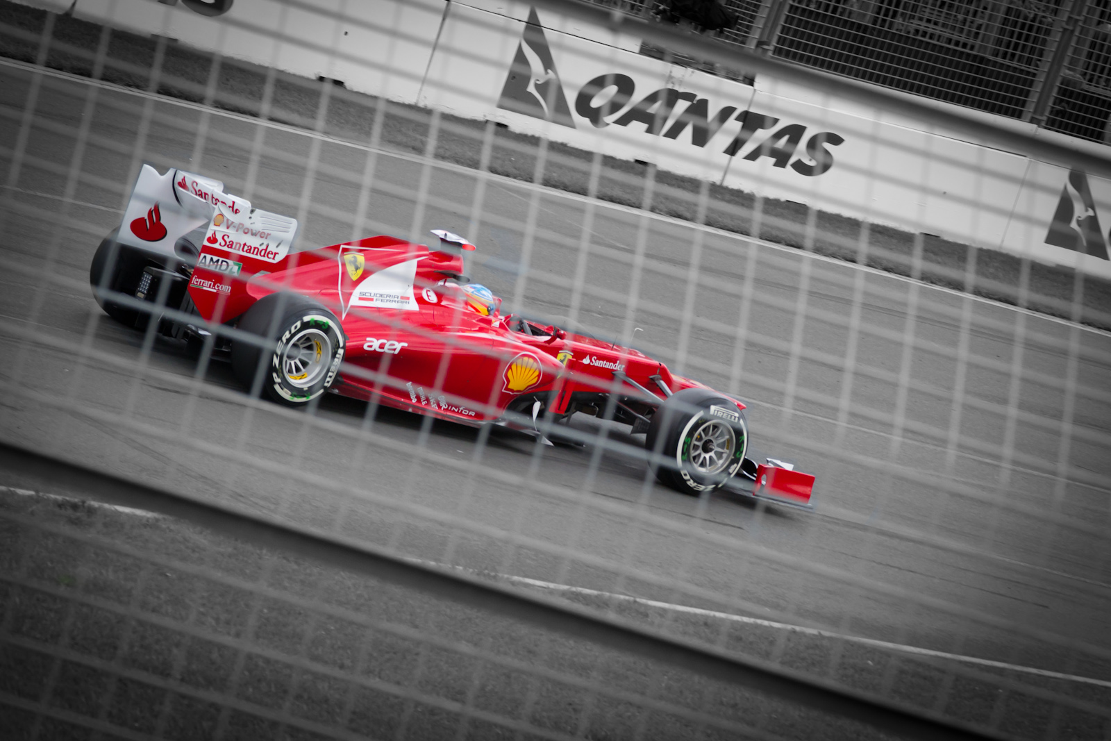 2012 Australian Grand Prix — Fernando Alonso